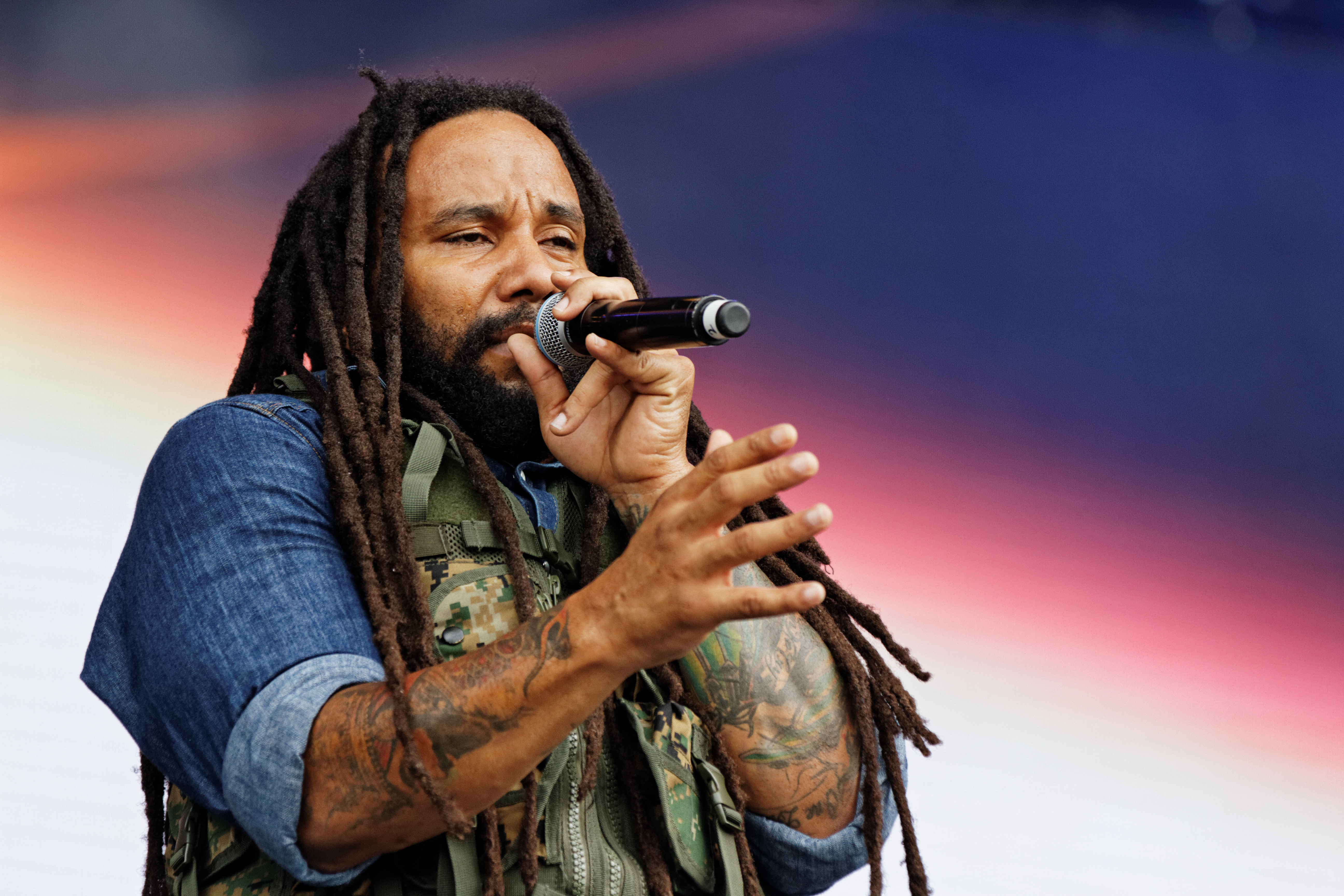 Ky-Mani Marley en concert sur la scène Glenmor lors du festival des Vieilles Charrues 2014.